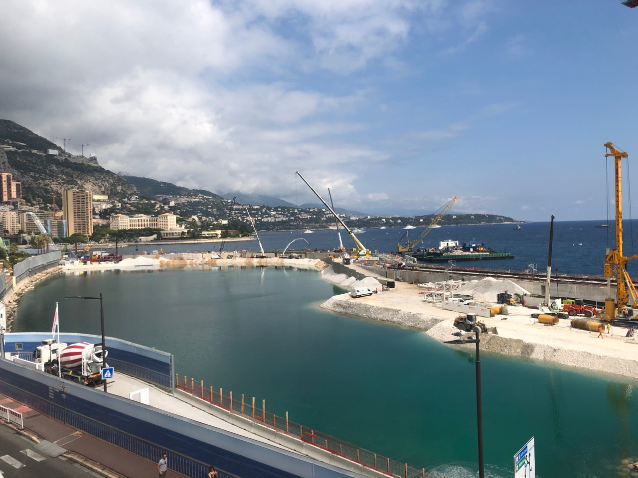 Nieuwe wijk Le Portier in aanbouw, foto genomen van aan de hoek van de Fairmont